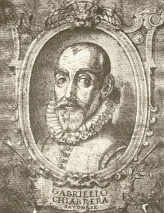 Gabriello Chiabrera, poeta italiano del Seicento